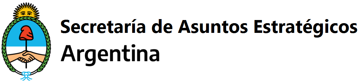 Secretaría de Asuntos Estratégicos